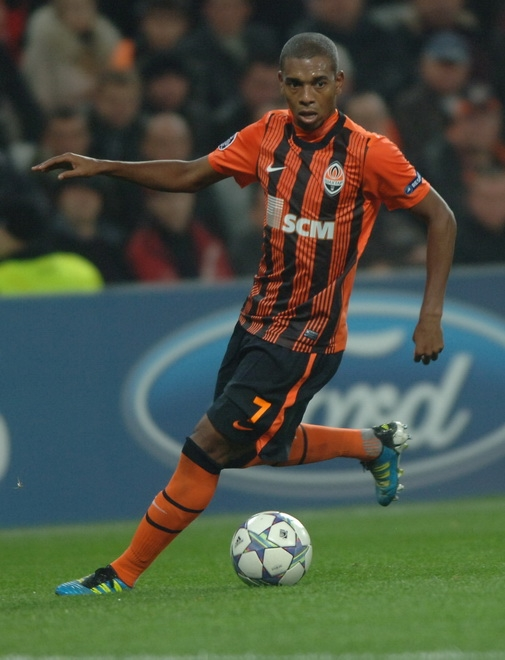 Фернандиньо — бразильский футболист.